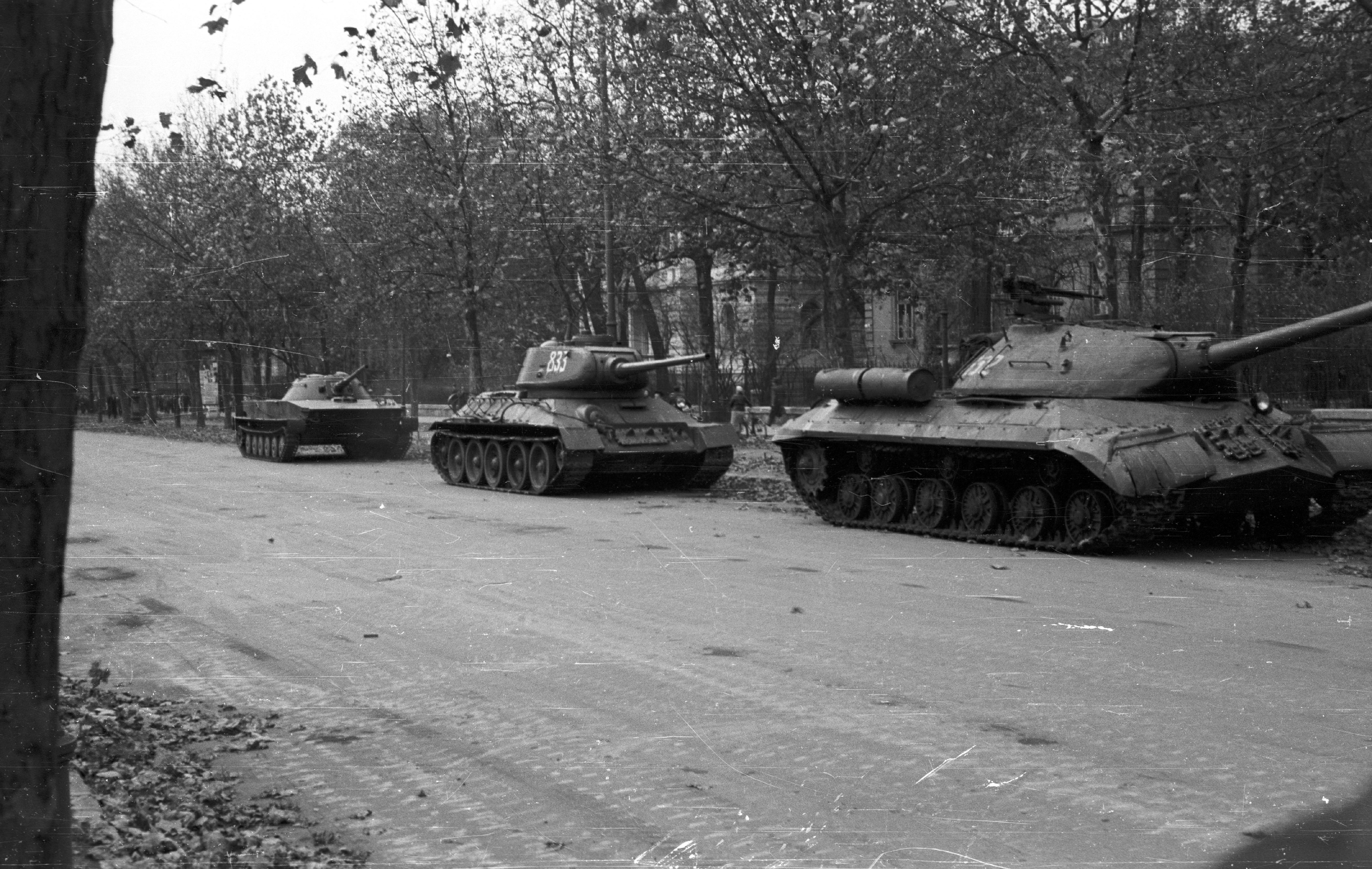 Andrássy út a Munkácsy Mihály utca felé nézve. Jobbról balra, típus szerint: egy ISZ-3 nehéz, egy T-34/85 közepes és egy PT-76 úszó harckocsi látható a képen. Location: Hungary, Budapest VI. Tags: turret number, Budapest, revolution, IS-3 tank Title: Andrássy út a Munkácsy Mihály utca felé nézve. Jobbról balra, típus szerint: egy ISZ-3 nehéz, egy T-34/85 közepes és egy PT-76 úszó harckocsi látható a képen.